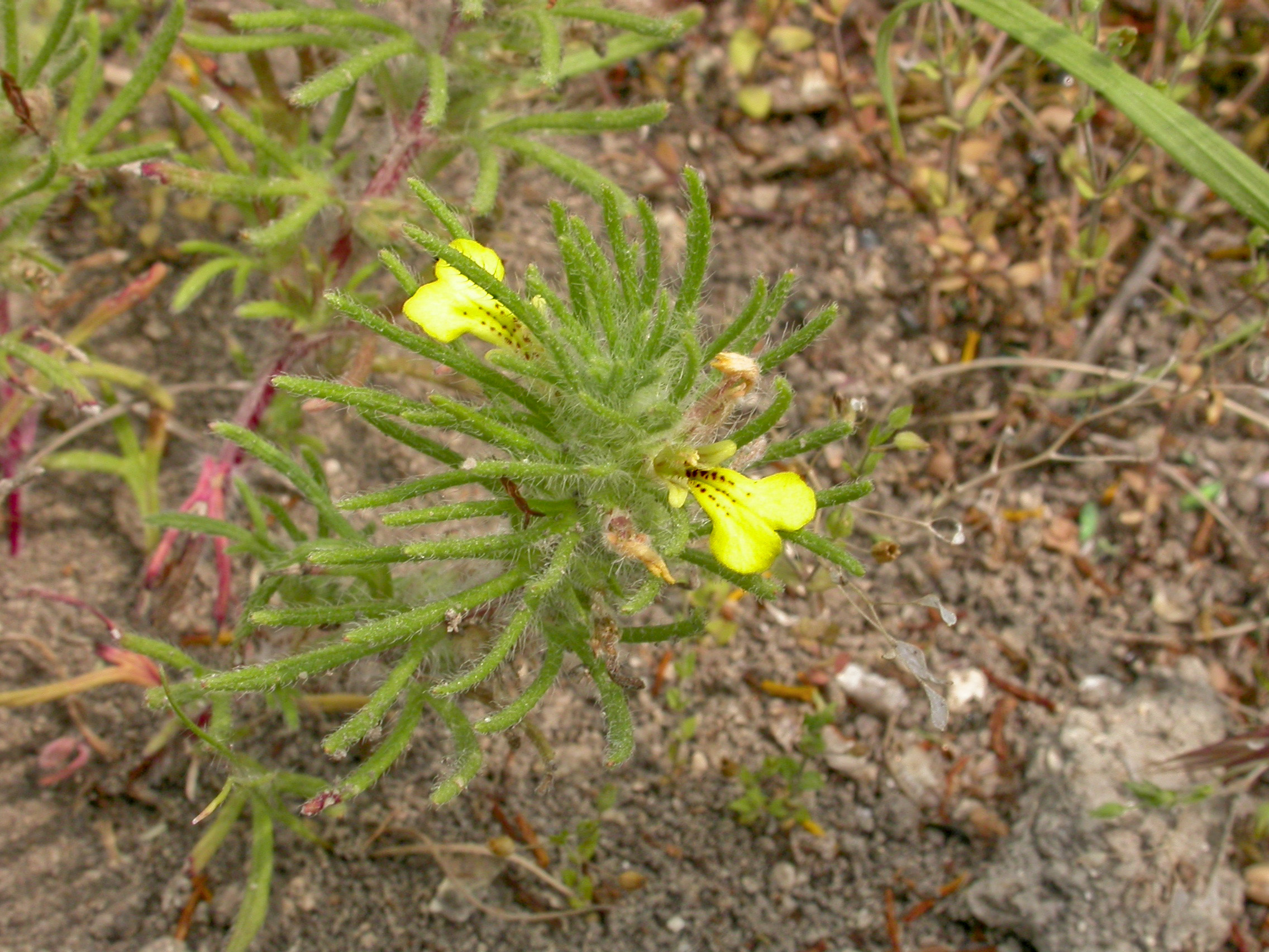 Ajuga chamaepitys - Bugle petit pin - Pelouse de Chézy-sur-Marne (Aisne) 29/05/2005